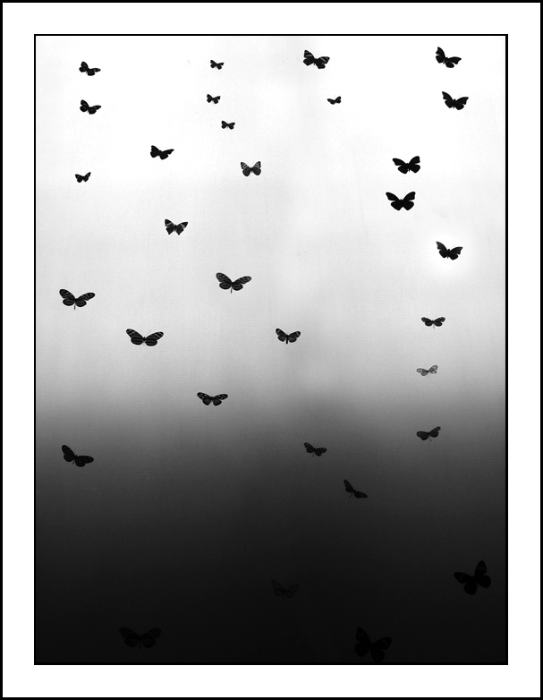 Lepidoptera migration - Artistic picture.